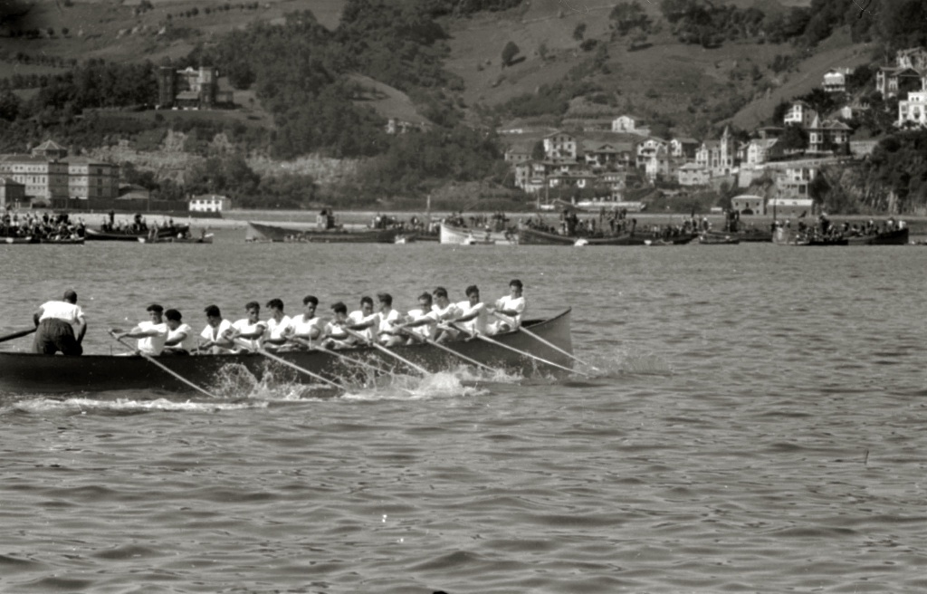 Título original: Regatas de traineras en la bahía de la Concha (10/127) Localización: San Sebastián (Guipúzcoa)